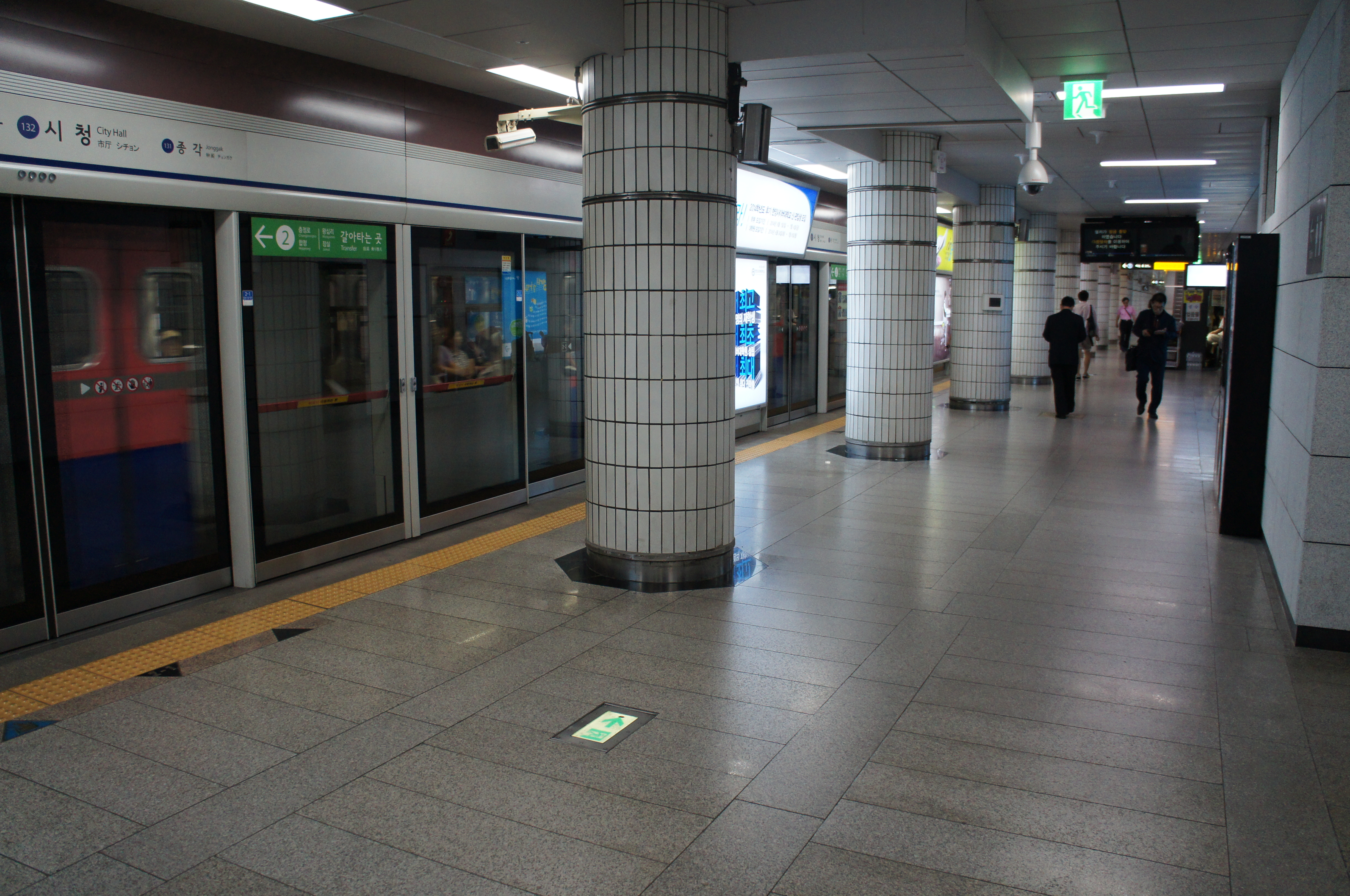 1호선 시청역 승강장